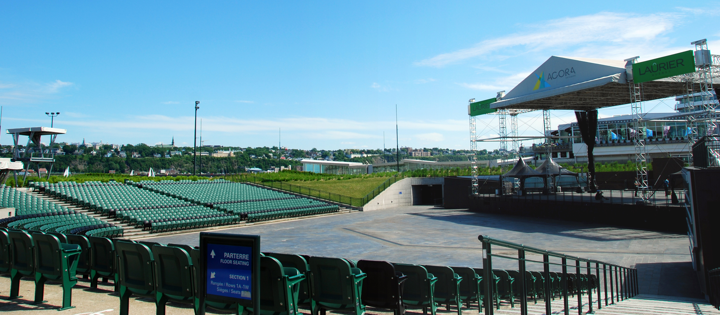 Agora du Vieux-Port (vue panoramique)